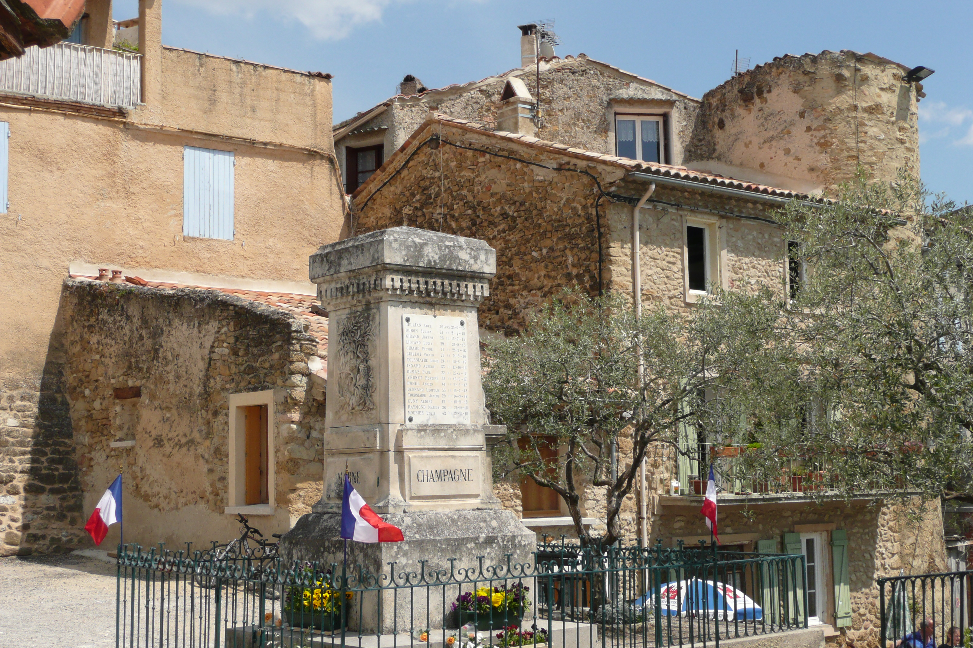 Mémorial de guerre à Puyméras.